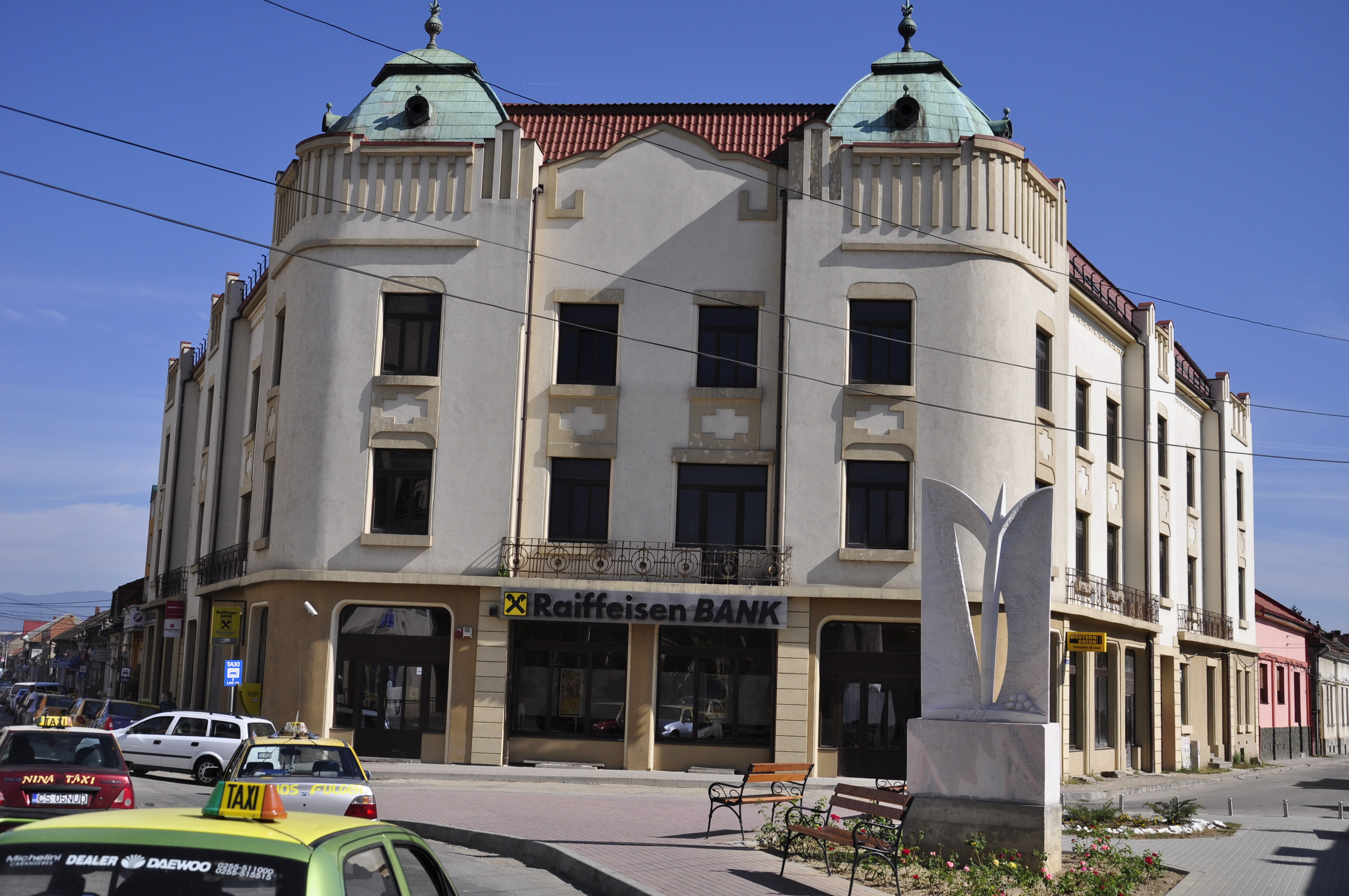 Azi spații firme, locuințe, amenajare hotelieră